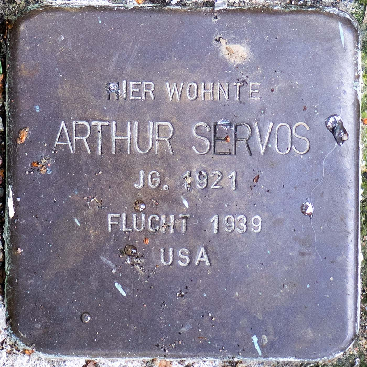 Stolperstein für Arthur Servos (Willich)